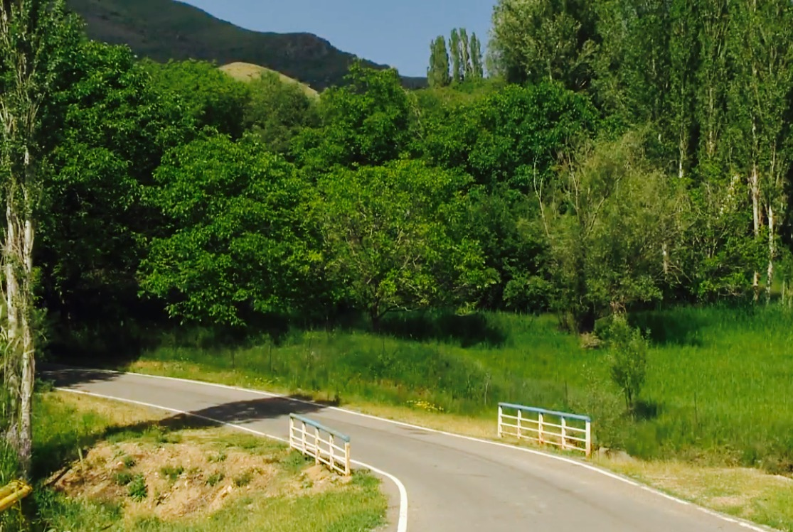 Ləkətağ kəndinin girişi